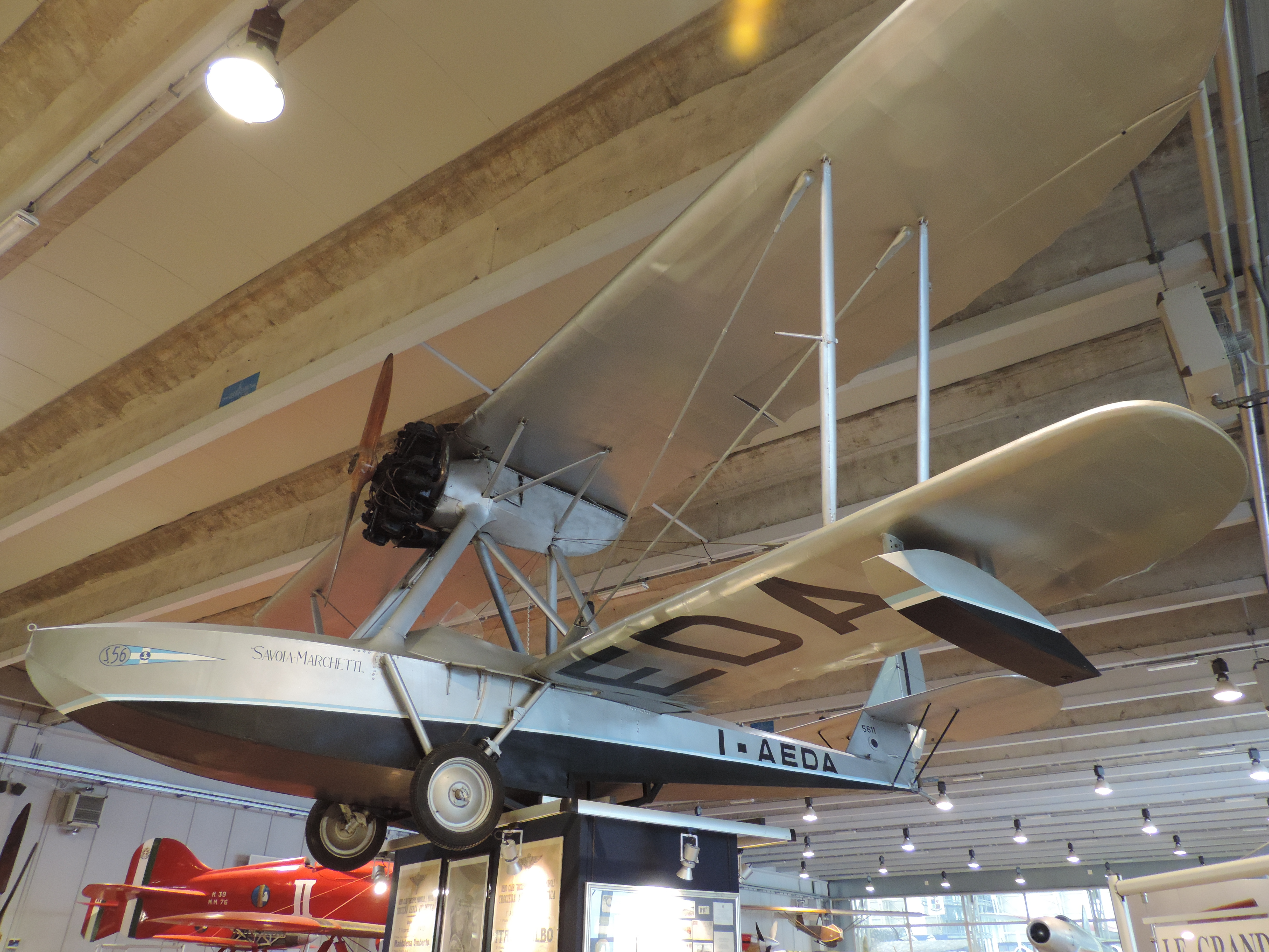 Savoia-Marchetti S.56 im Luftwaffenmuseum Vigna di Valle